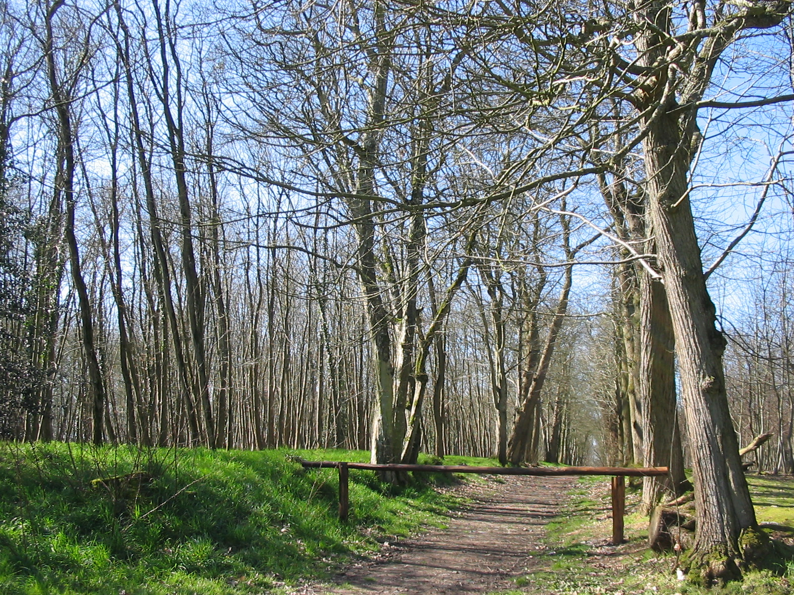 Parc de la Villenière - 49370 La Pouëze.